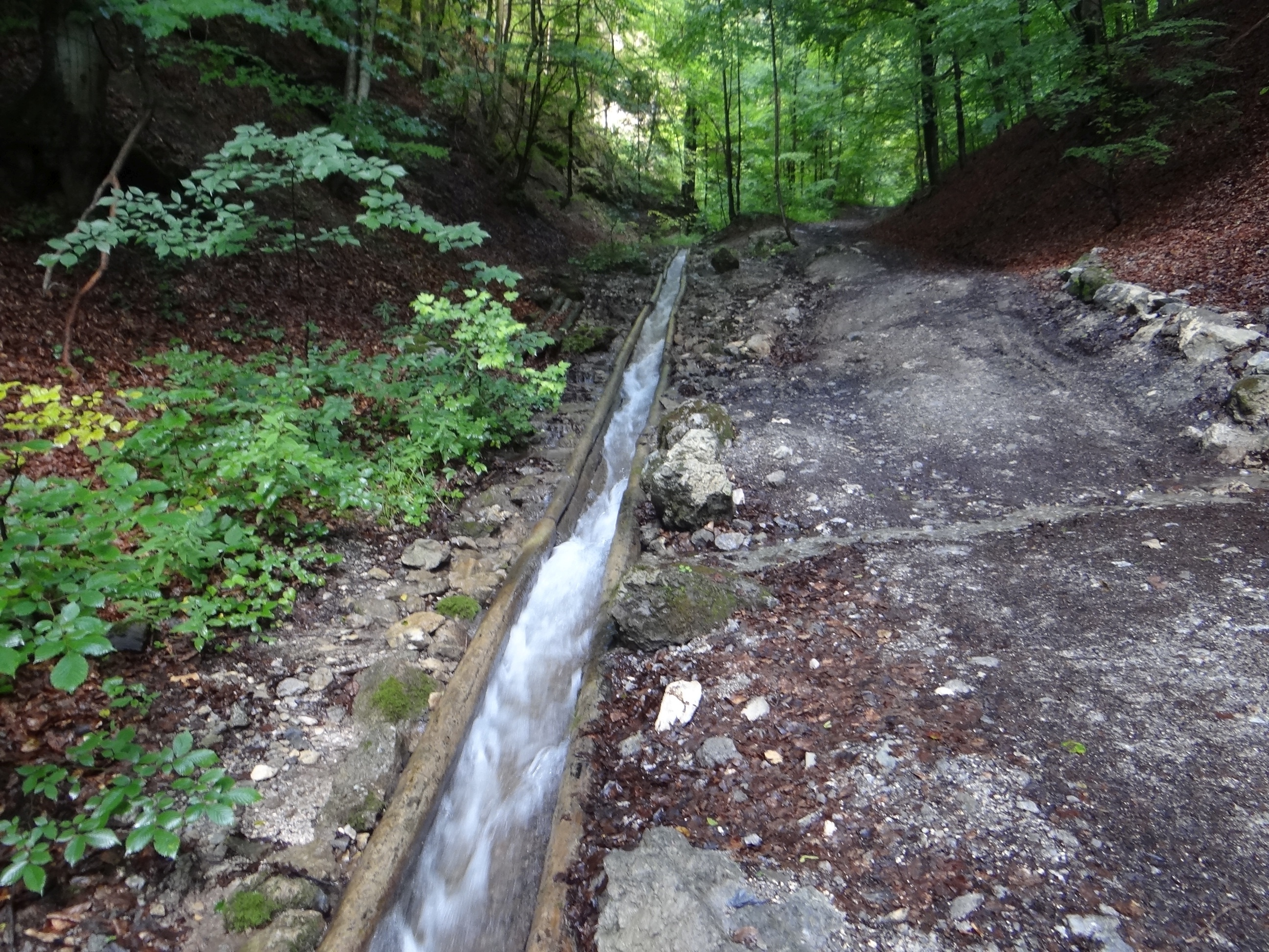 Dolina Rakytov w Harmanecu (Wielka Fatra). Potok Rakytov